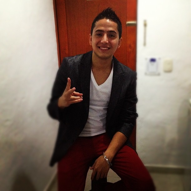 Andy Rivera